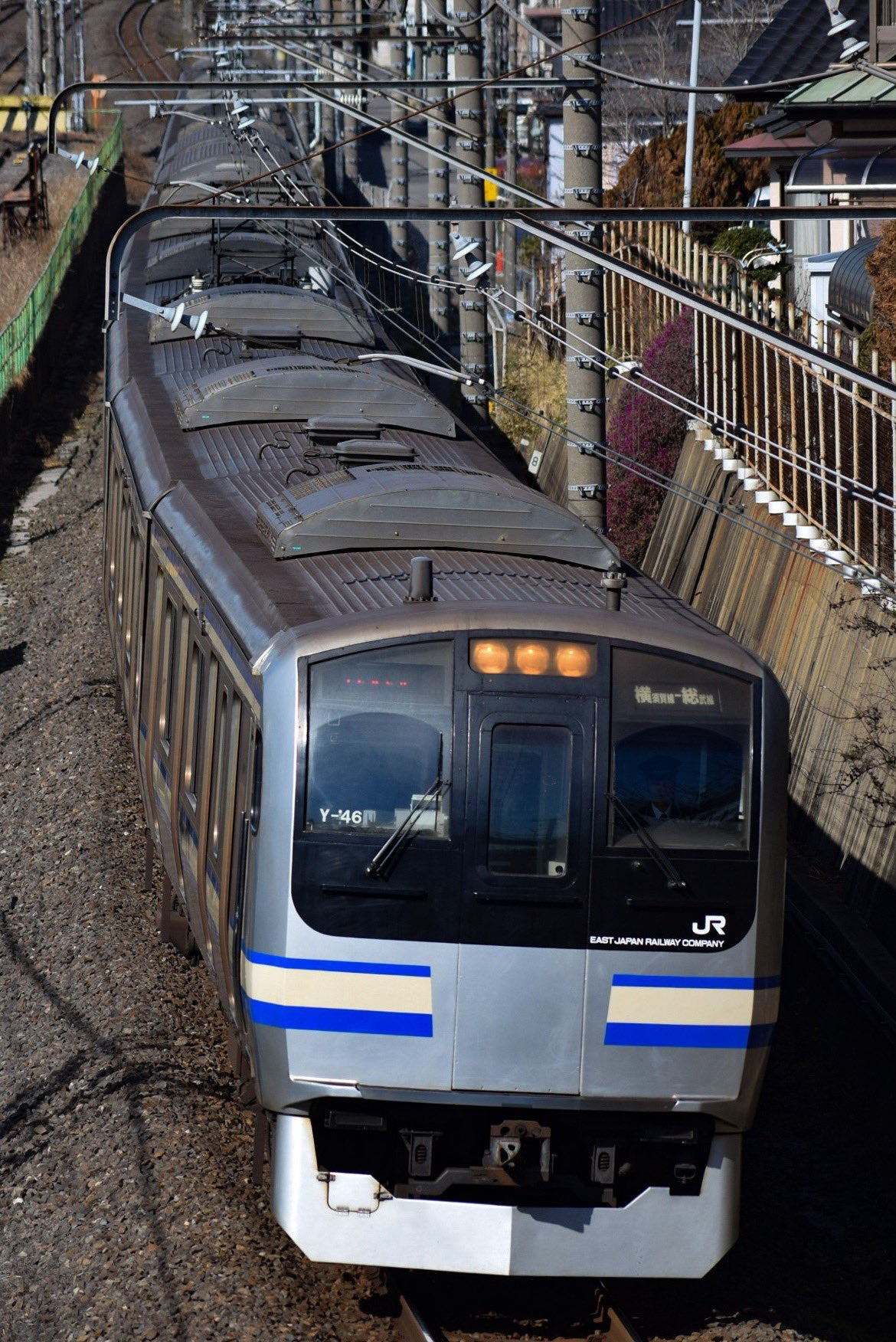 総武快速線を走るE217系クラY-48編成(快速千葉行)